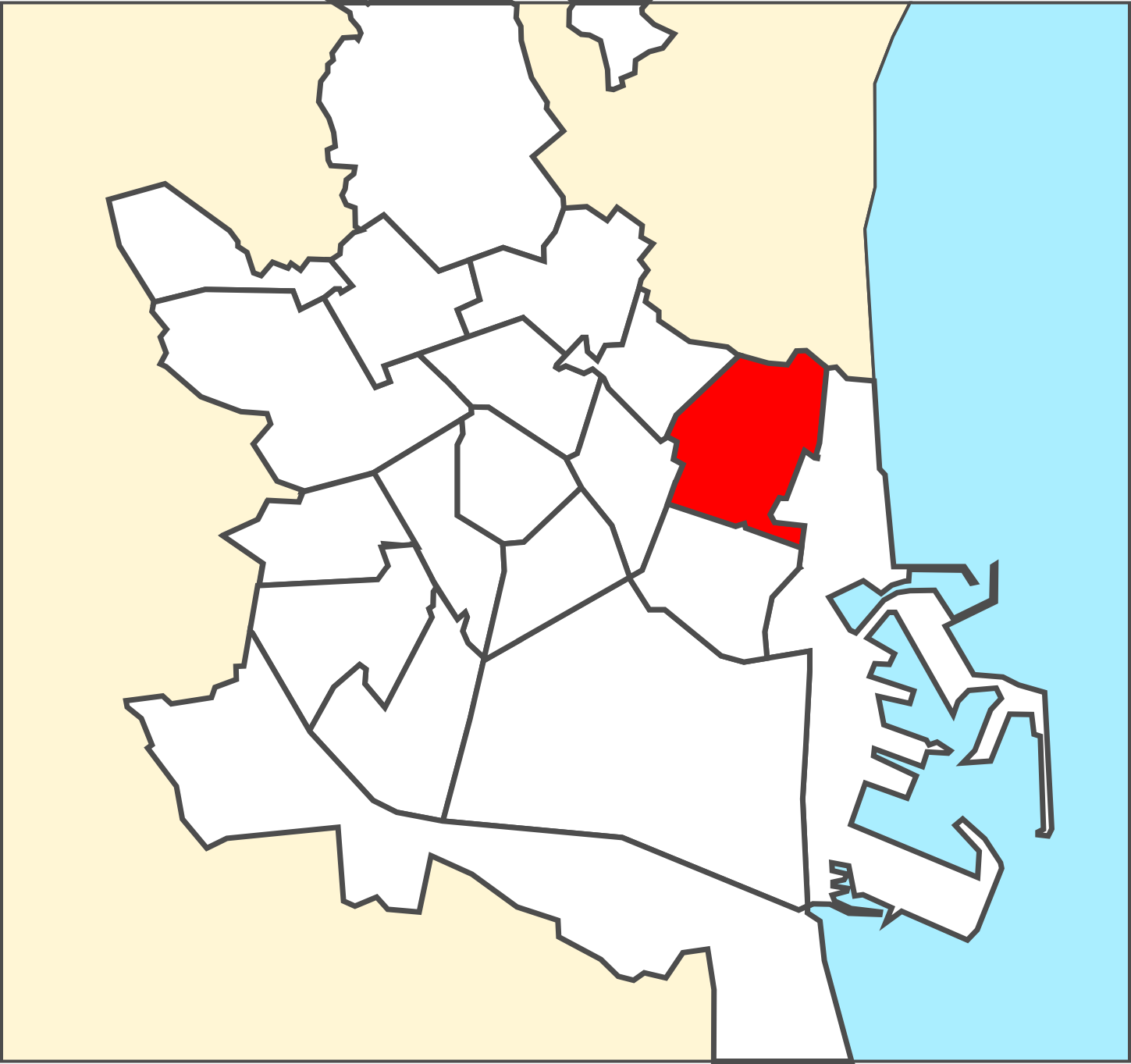 Districte d'Algirós.